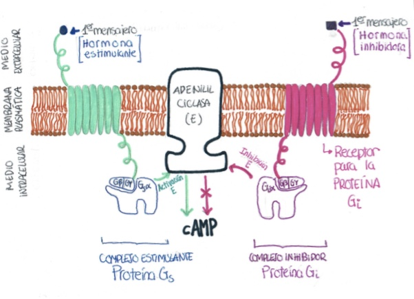 Proceso de activación del complejo Adenilil Ciclasa, interviene la Proteína Gs (en verde). Proceso de inhibición del complejo Adenil Ciclasa, interviene la Proteína Gi (en rosa).